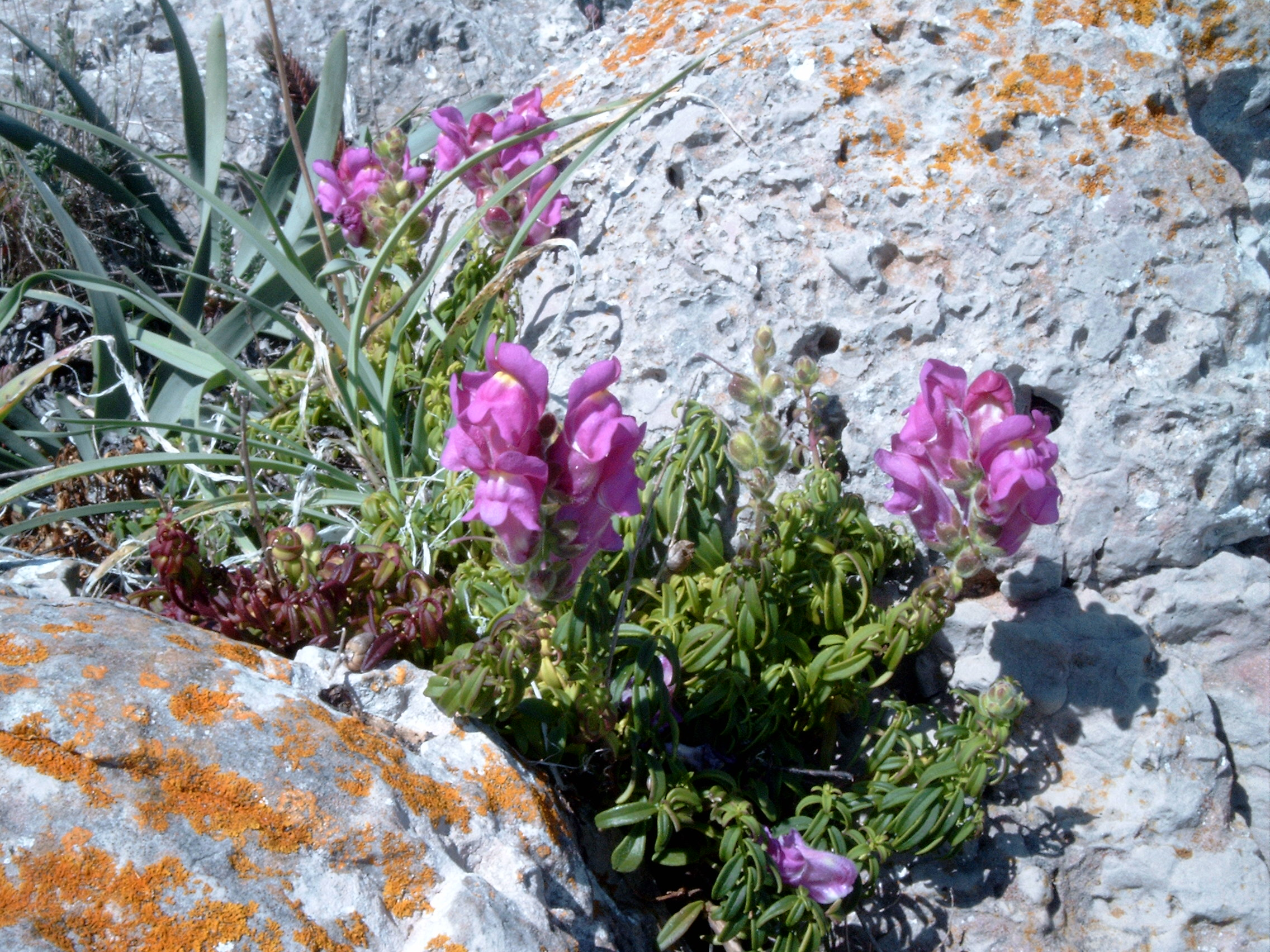 Species Antirrhinum majus subsp. linkianum Familia Plantaginaceae